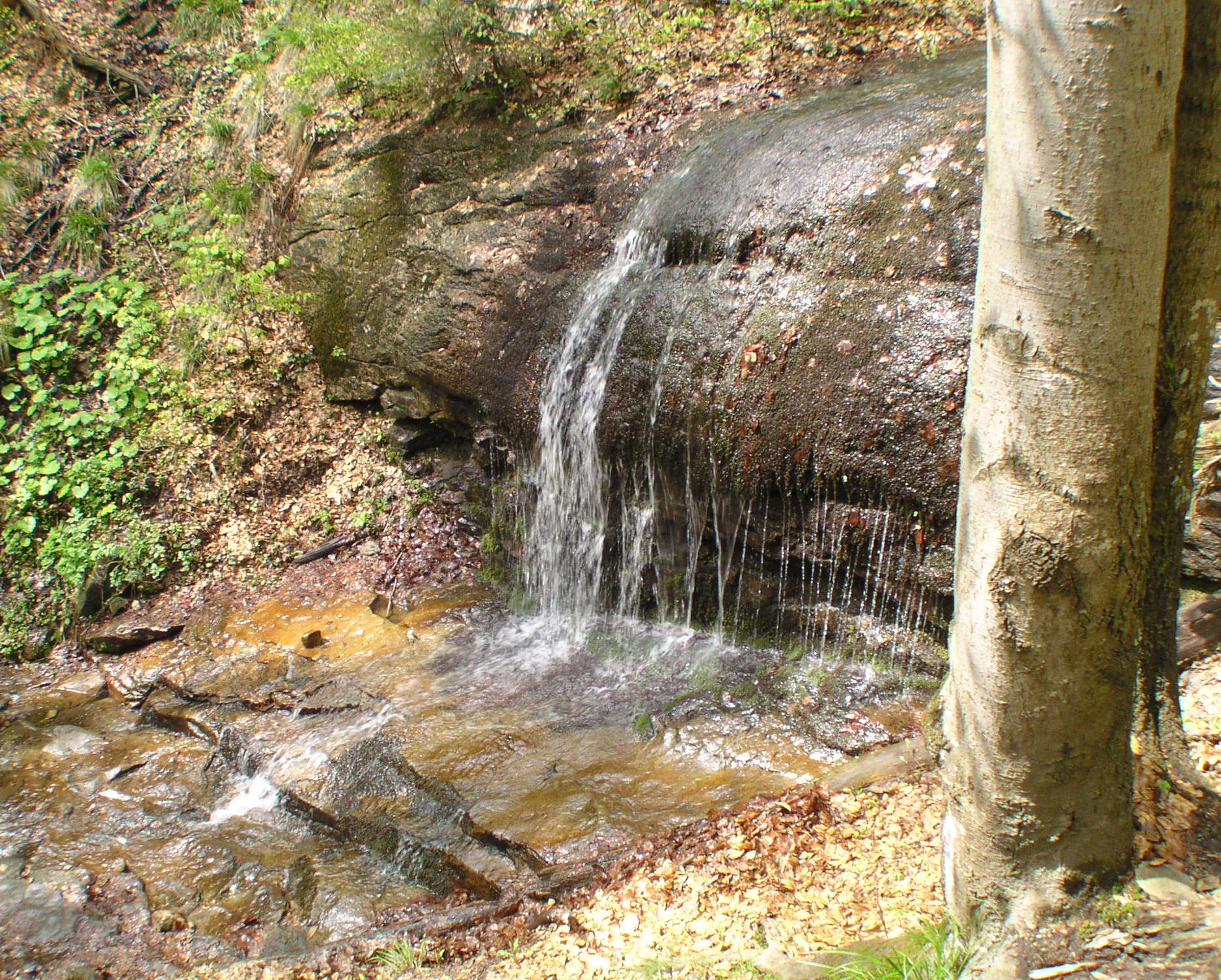 Wodospad na potoku Dusica- największy w Beskidzie Małym.